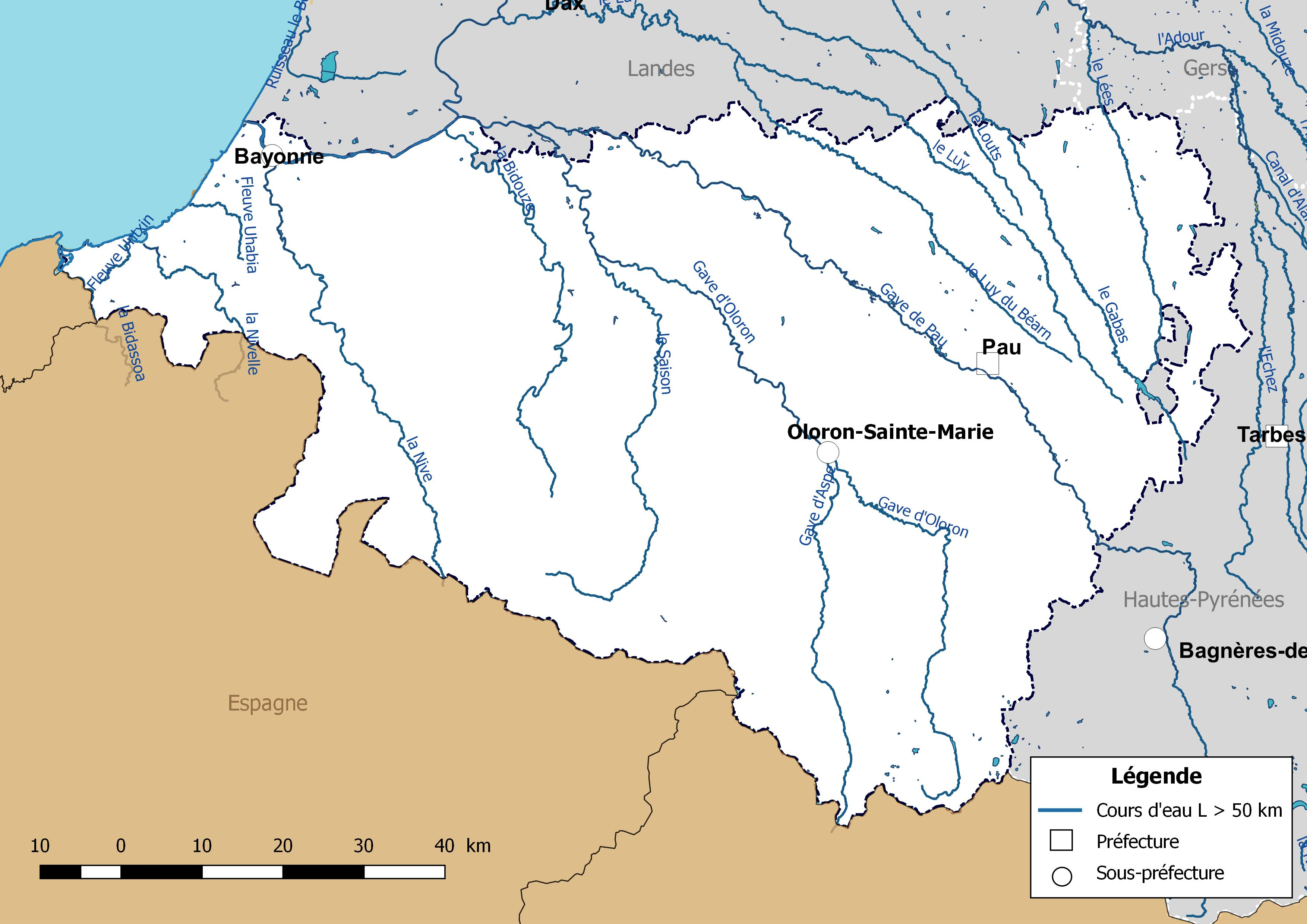 Carte des cours d'eau de longueur supérieure à 50 km drainant le département des Pyrénées-Atlantiques (France).